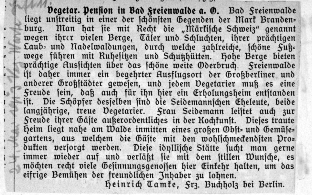 Vegetarische Pension in Bad Freienwalde a.O., Vegetarische Warte, 1913, Heft 11, Monatsschrift für naturgemäße Lebensweise und Gesundheitspflege, Zeitschrift für naturgemäße Lebenskunst, 24.05.1913, Deutscher Vegetarier-Bund, Leipzig / Frankfurt a.M.